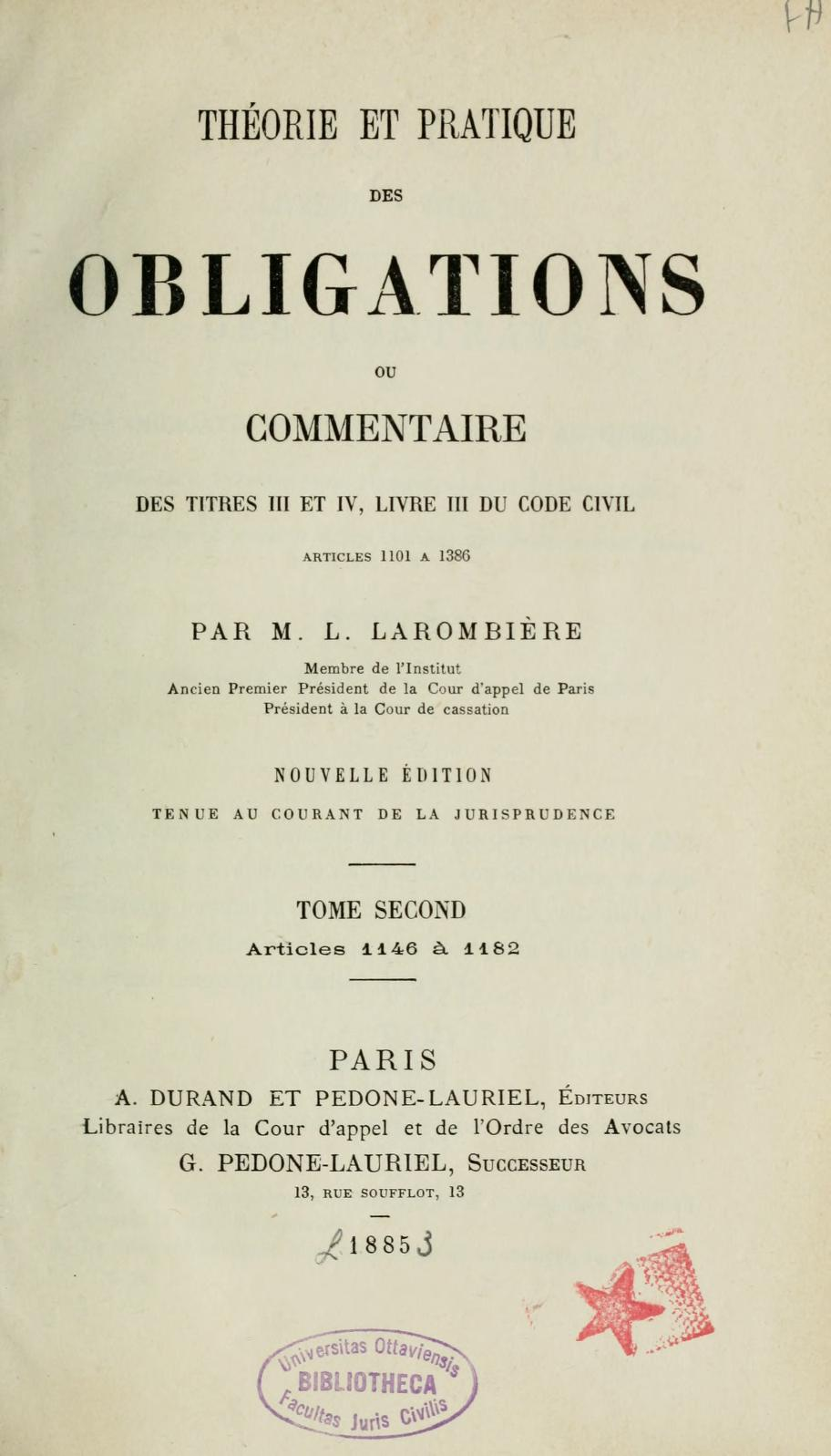 Théorie et pratique des obligations, ou, Commentaire des titres III et IV, livre III du Code civil